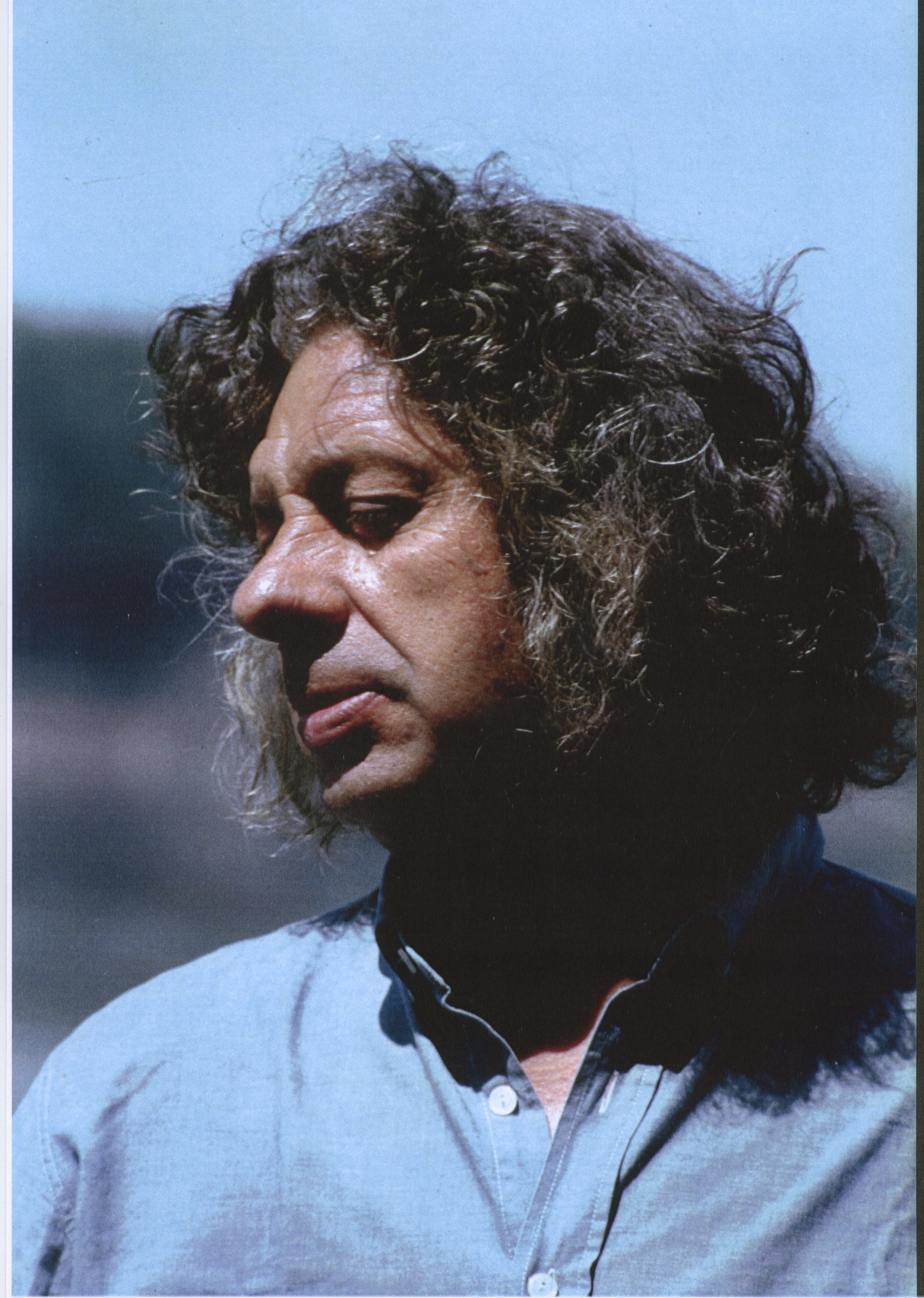 Foto scattata mentre G.Morvay sta dipingendo nella primavera del 1980